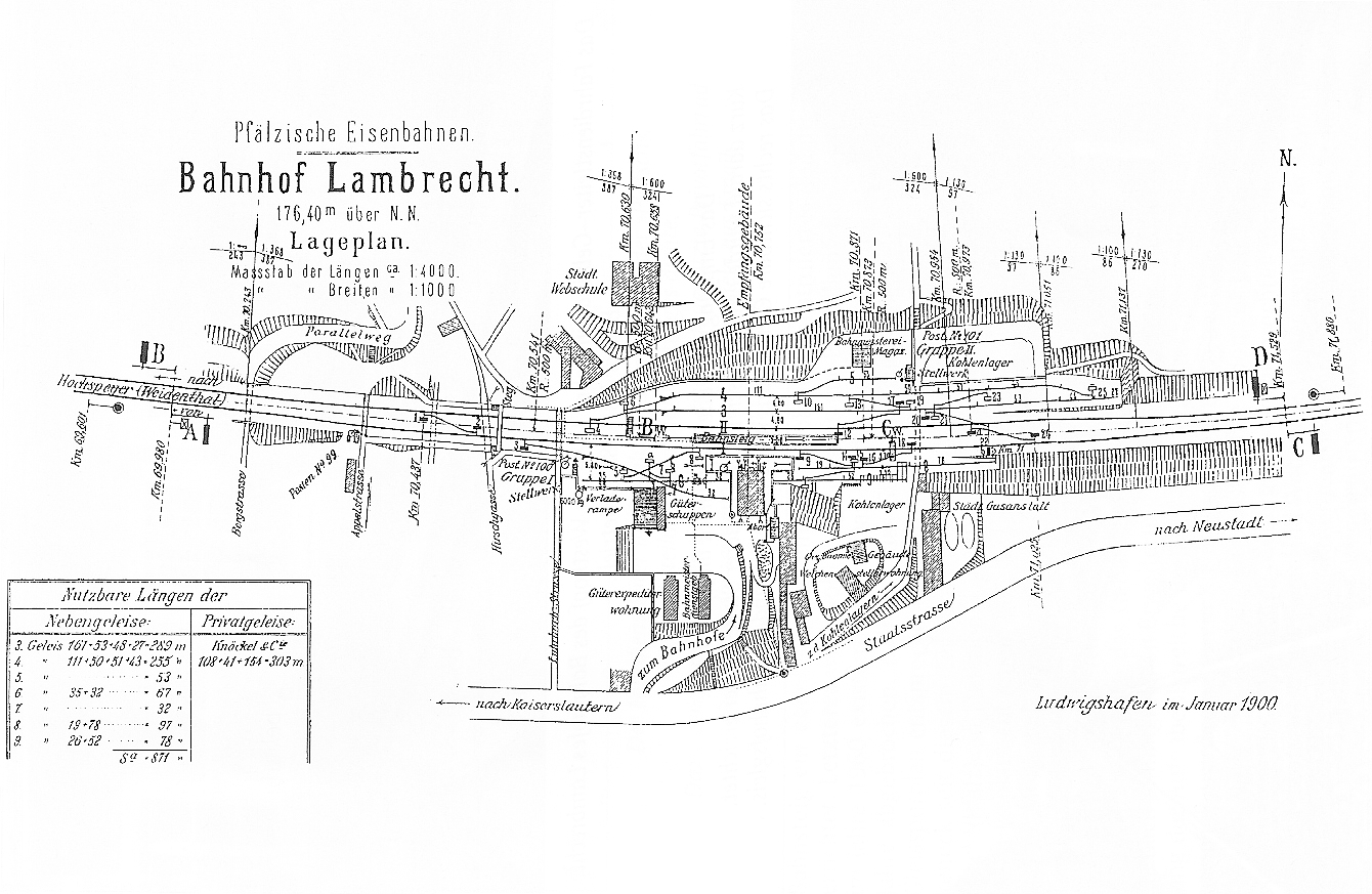 Gleisplan des Bahnhof Lambrecht um 1900